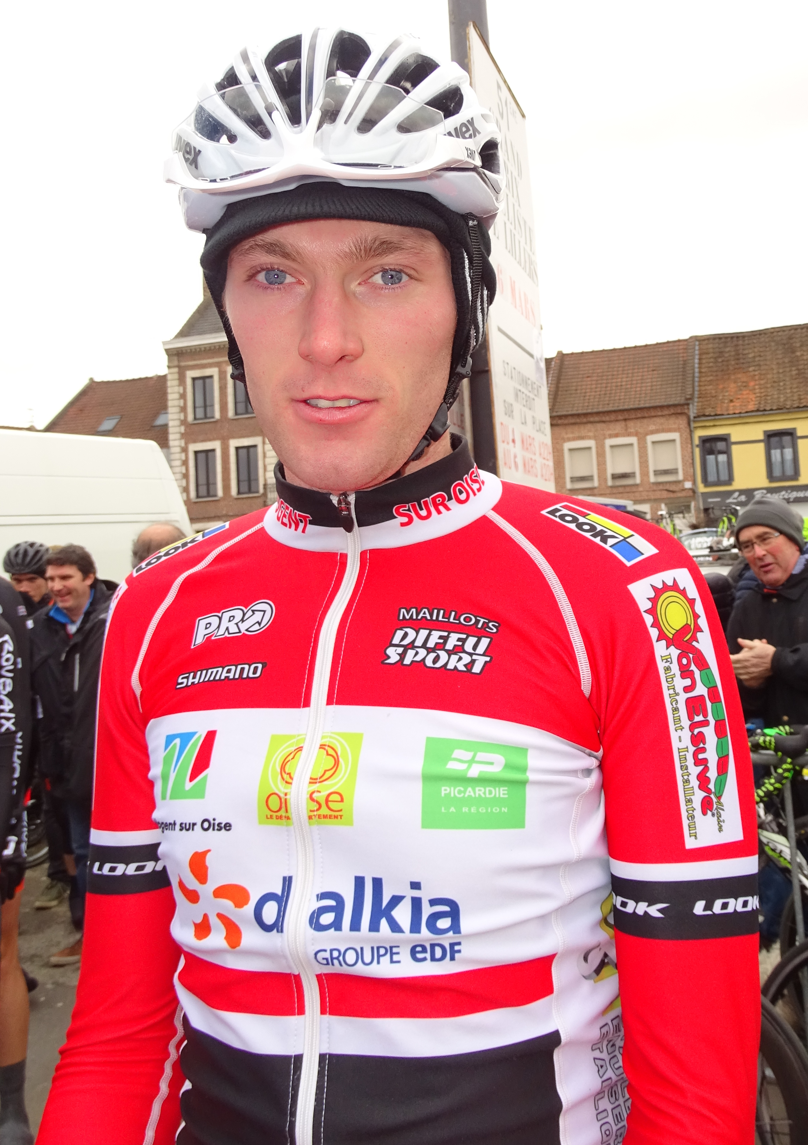 Reportage réalisé le dimanche 6 mars à l'occasion du départ et de l'arrivée du Grand Prix de Lillers-Souvenir Bruno Comini 2016 à Lillers, Pas-de-Calais, Nord-Pas-de-Calais, France.